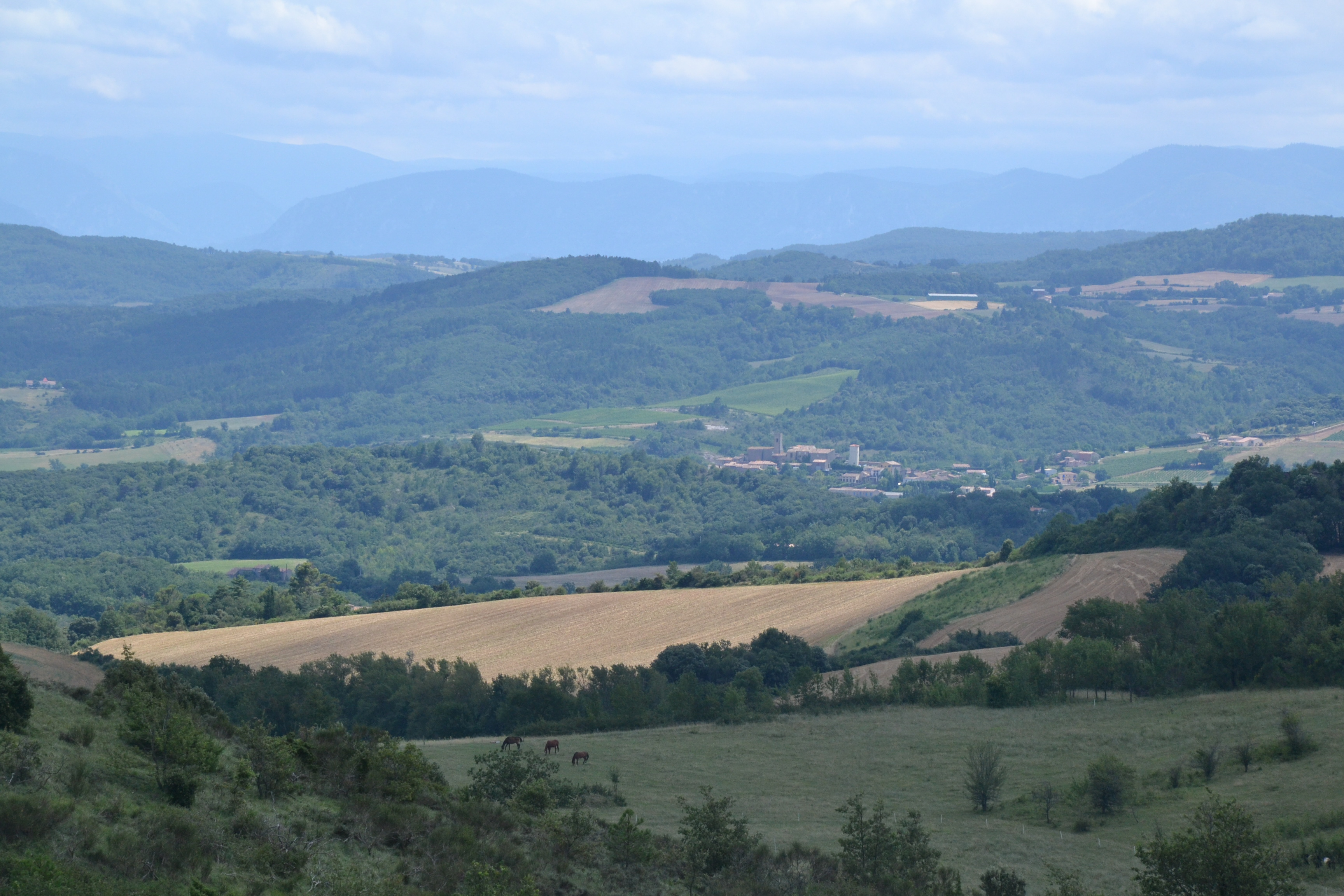 Villelongue-d'Aude (Aude, France), depuis le pech des Trois Seigneurs à Alaigne.